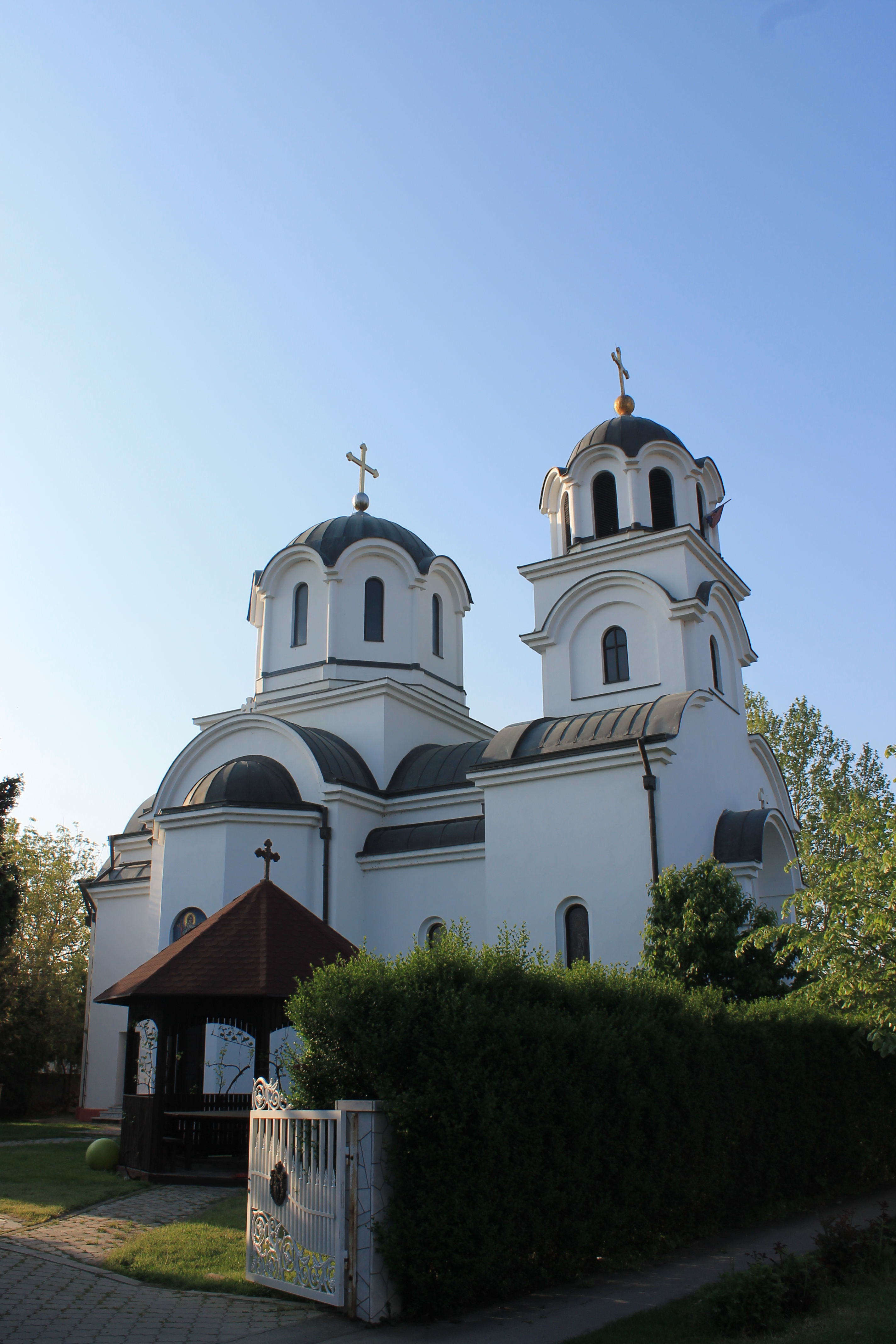 Crkva Sv. velikomučenika Georgija